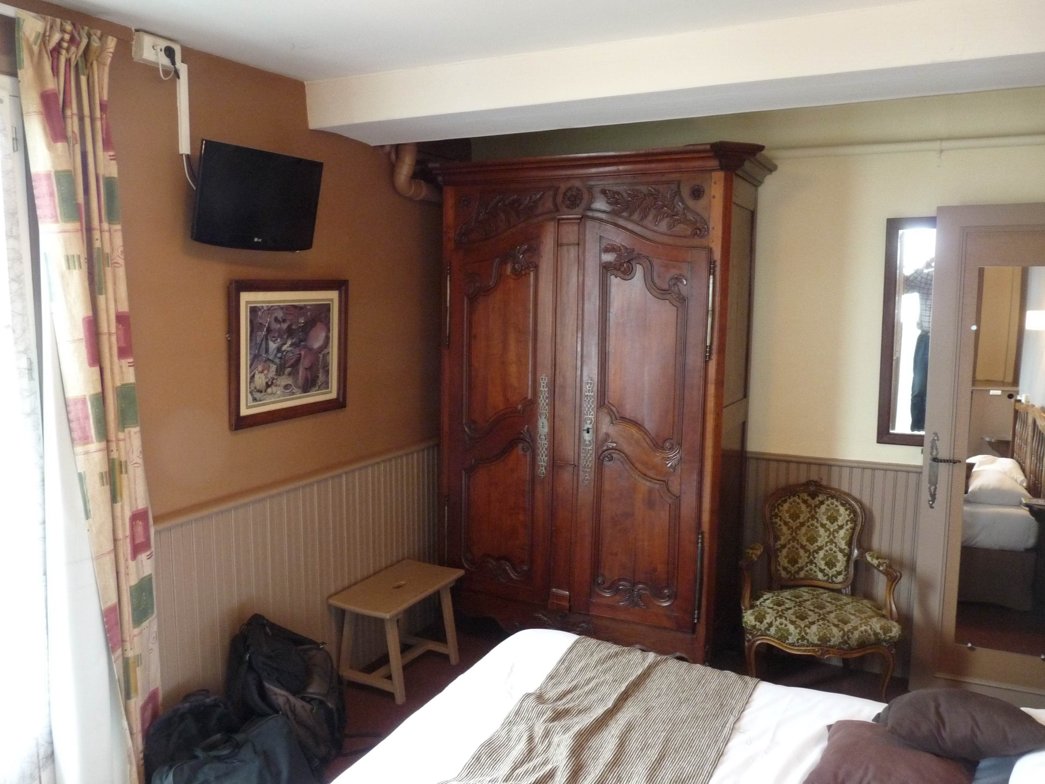 Hotelkamer Hôtel de l'Europe in Tours. Een combinatie van oud en nieuw.